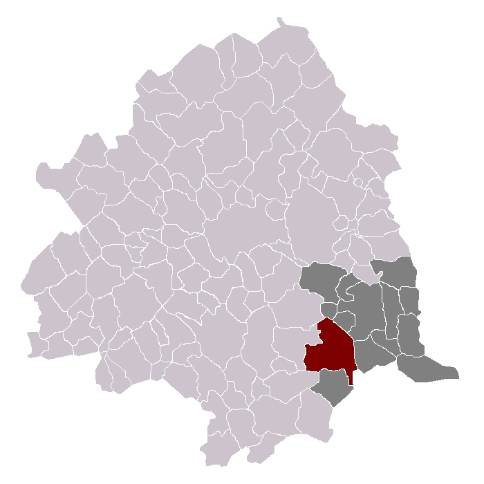 Templeuve dans son canton et son arrondissement